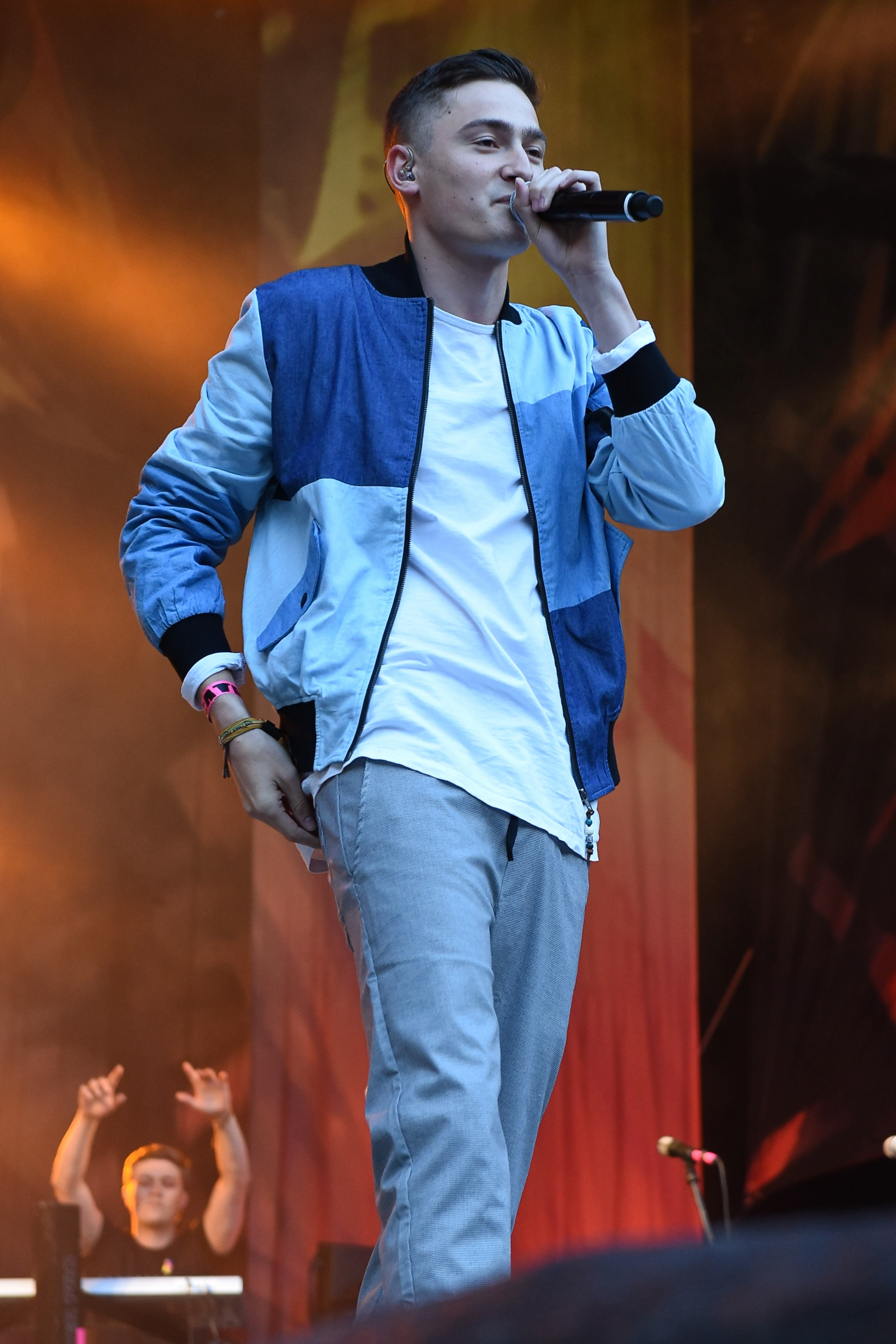 Bengio beim Ruhr Reggae Summer in Mülheim